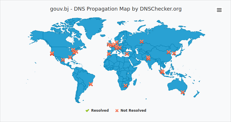 Capture d'écran des résultats de gouv.bj sur le 15 mai 2020 à 21h40